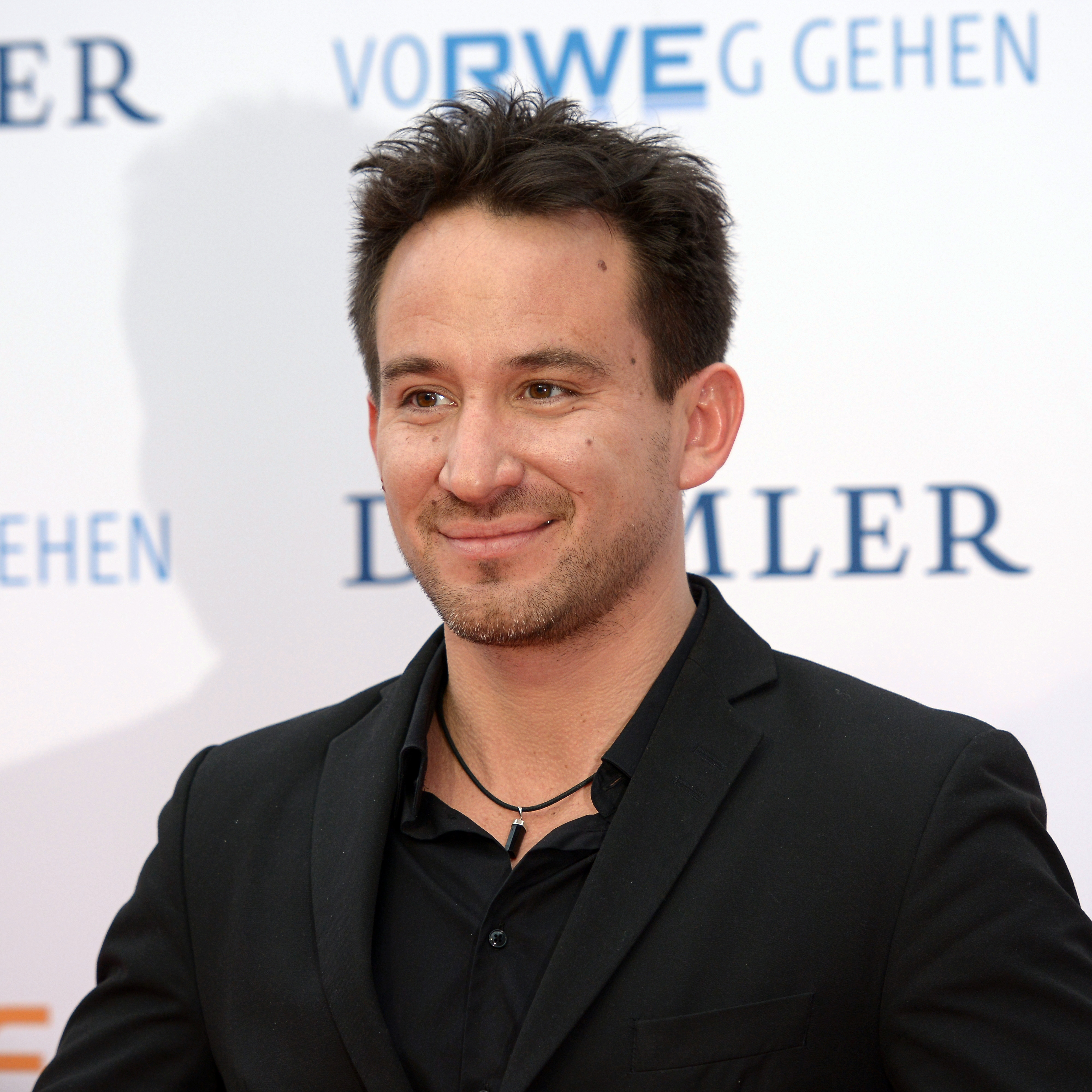 Marcel Mettelsiefen bei der Verleihung des Grimme-Preises 2015.